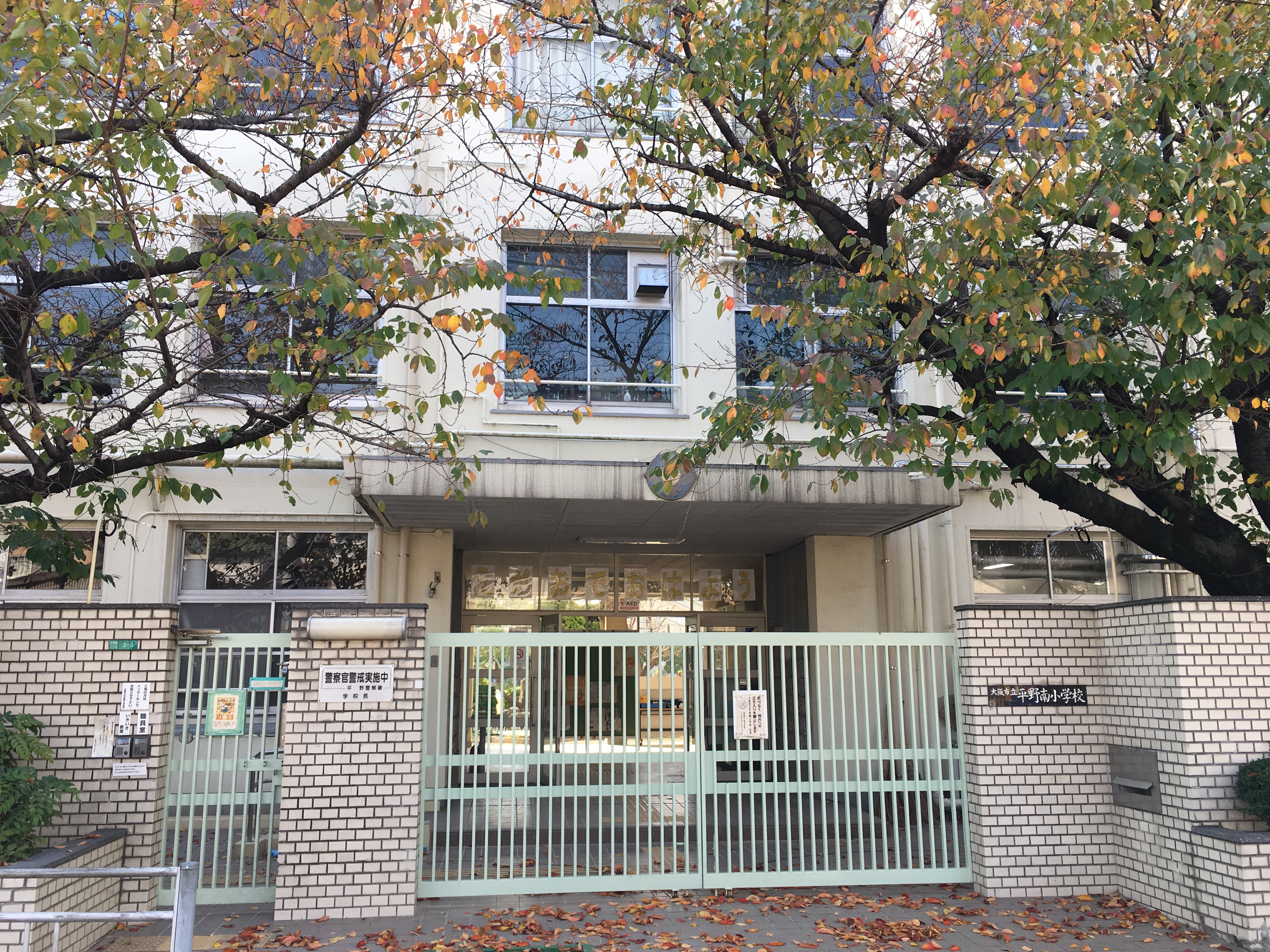 平野南小学校